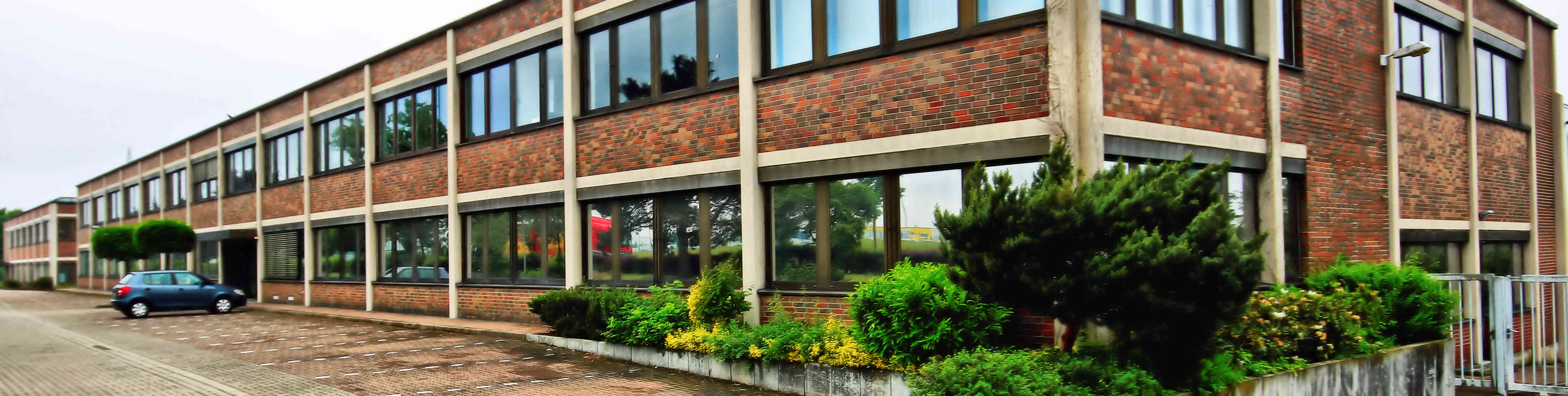 Ansicht des Ficosa Werks Wolfenbüttel